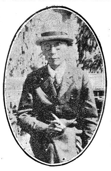 1926년 11월의 서재필